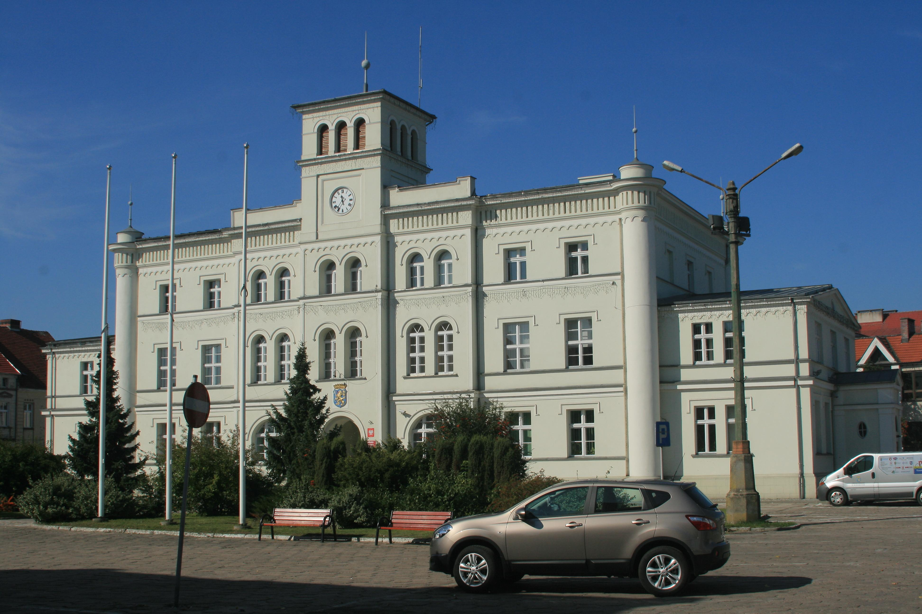 Skwierzyna, Poland